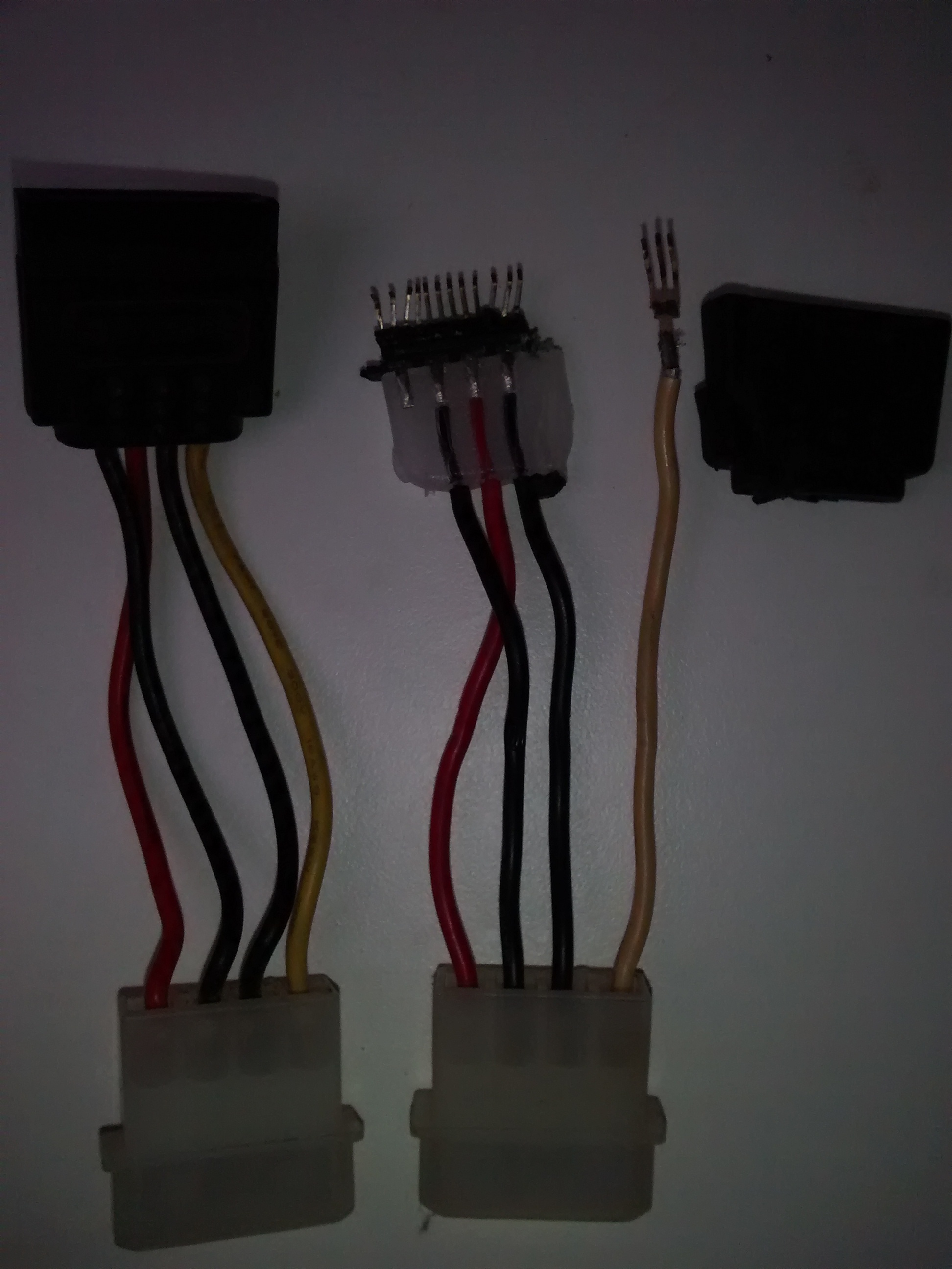 un adaptador de corriente ata a serial ata o sata